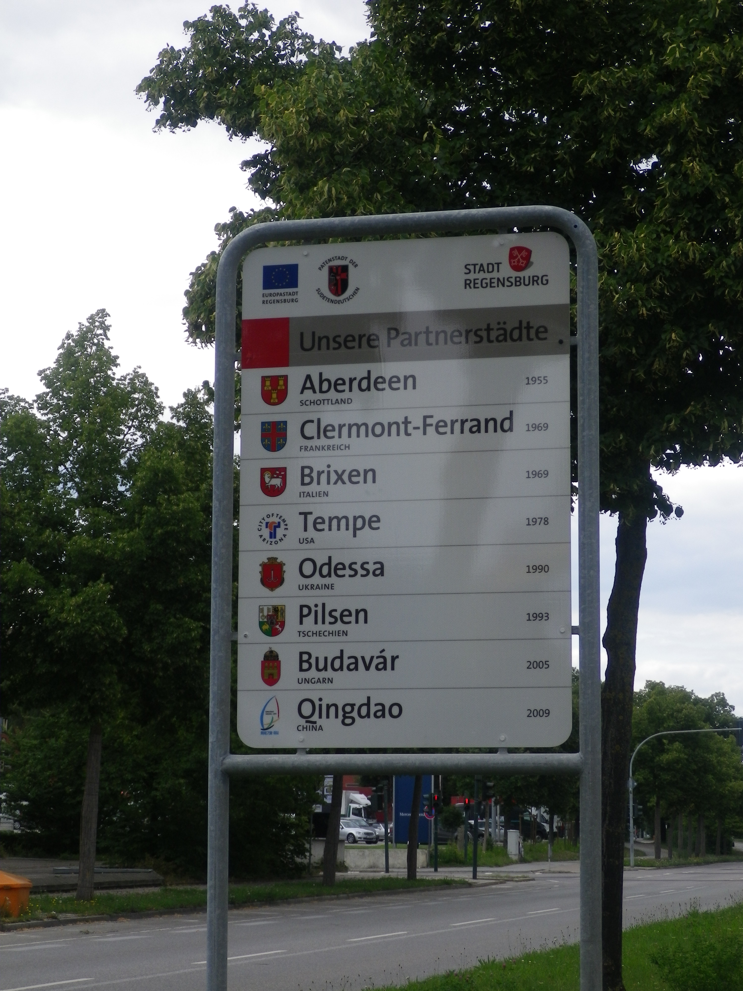 Ortseingangsschild Regensburgs mit PartnerstädtenPentax Optio H90